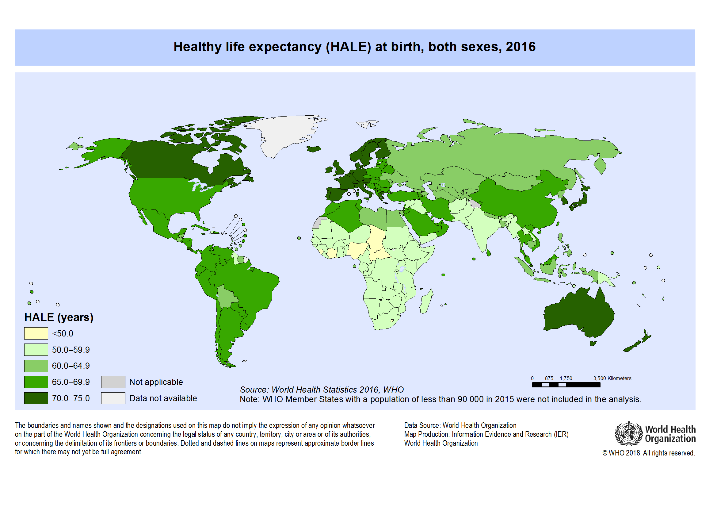 国ごとの平均寿命（2016年）